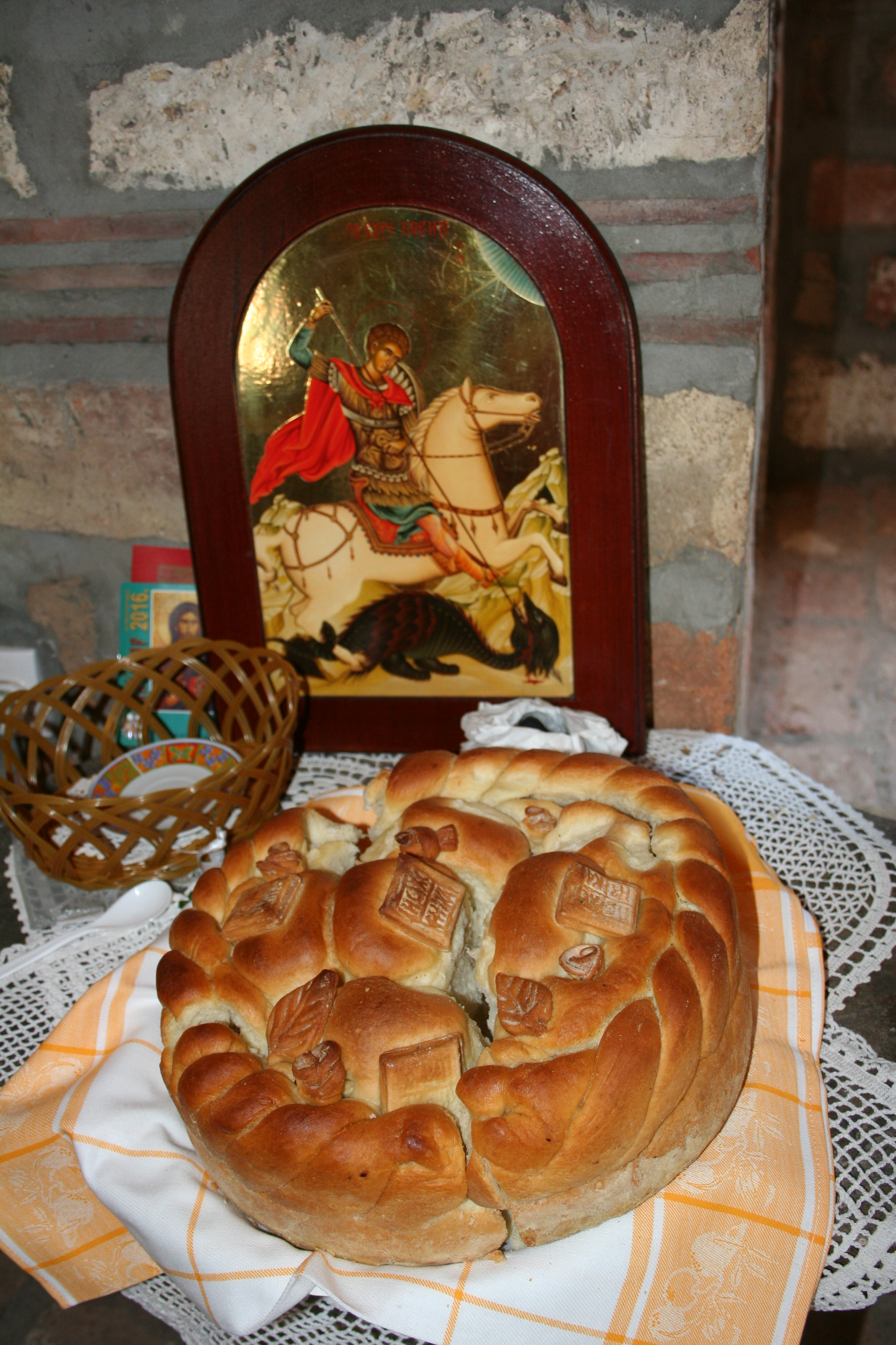 Crkva Svetog Jovana Šangajskog, Lipove vode, Cer